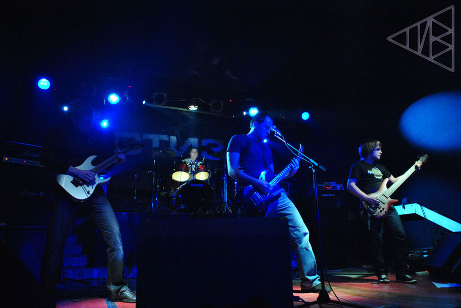 группа "Стиз" в клубе Арктика